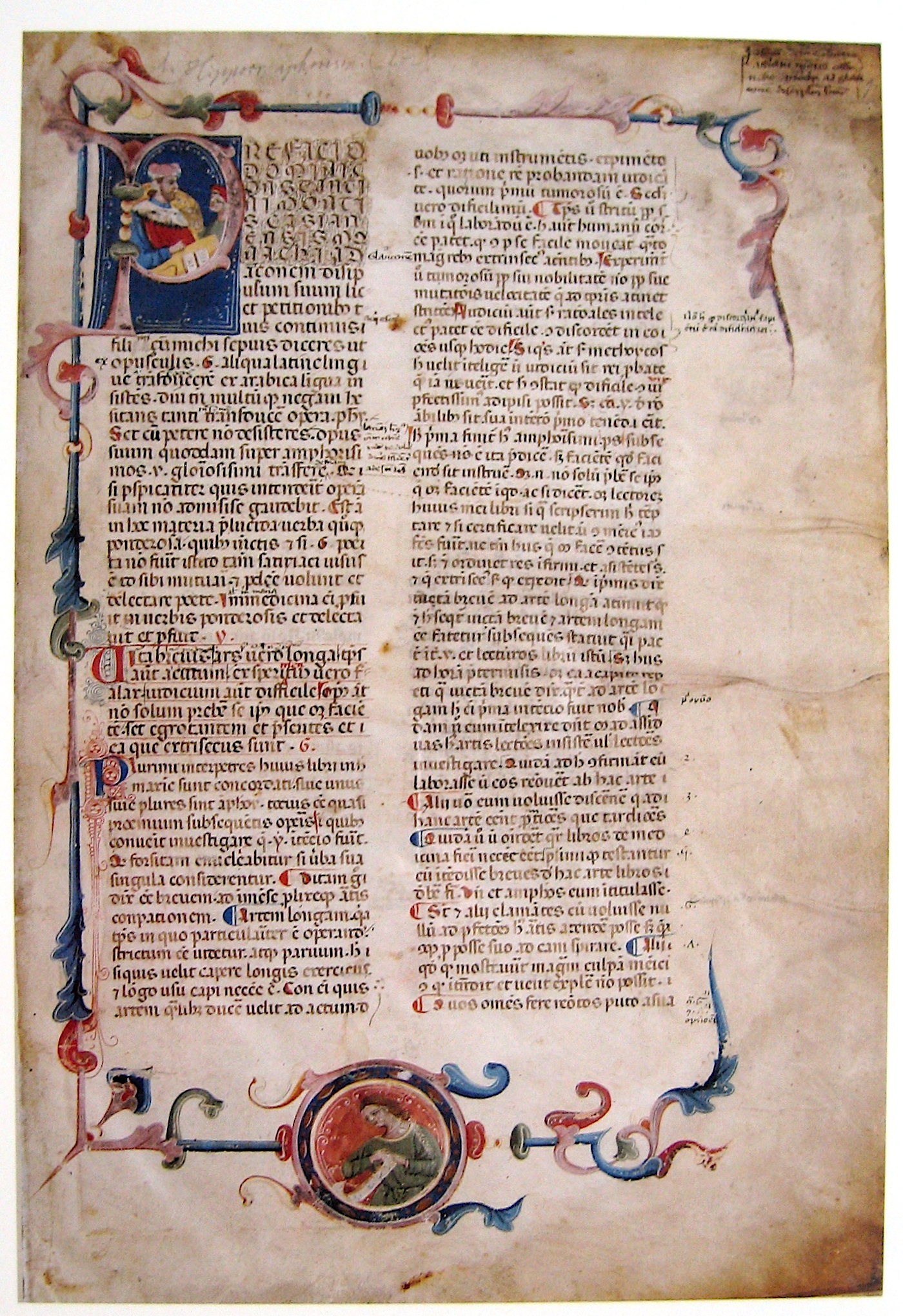 Reproduktion eines Blattes aus der Handschriftensammlung Amploniana